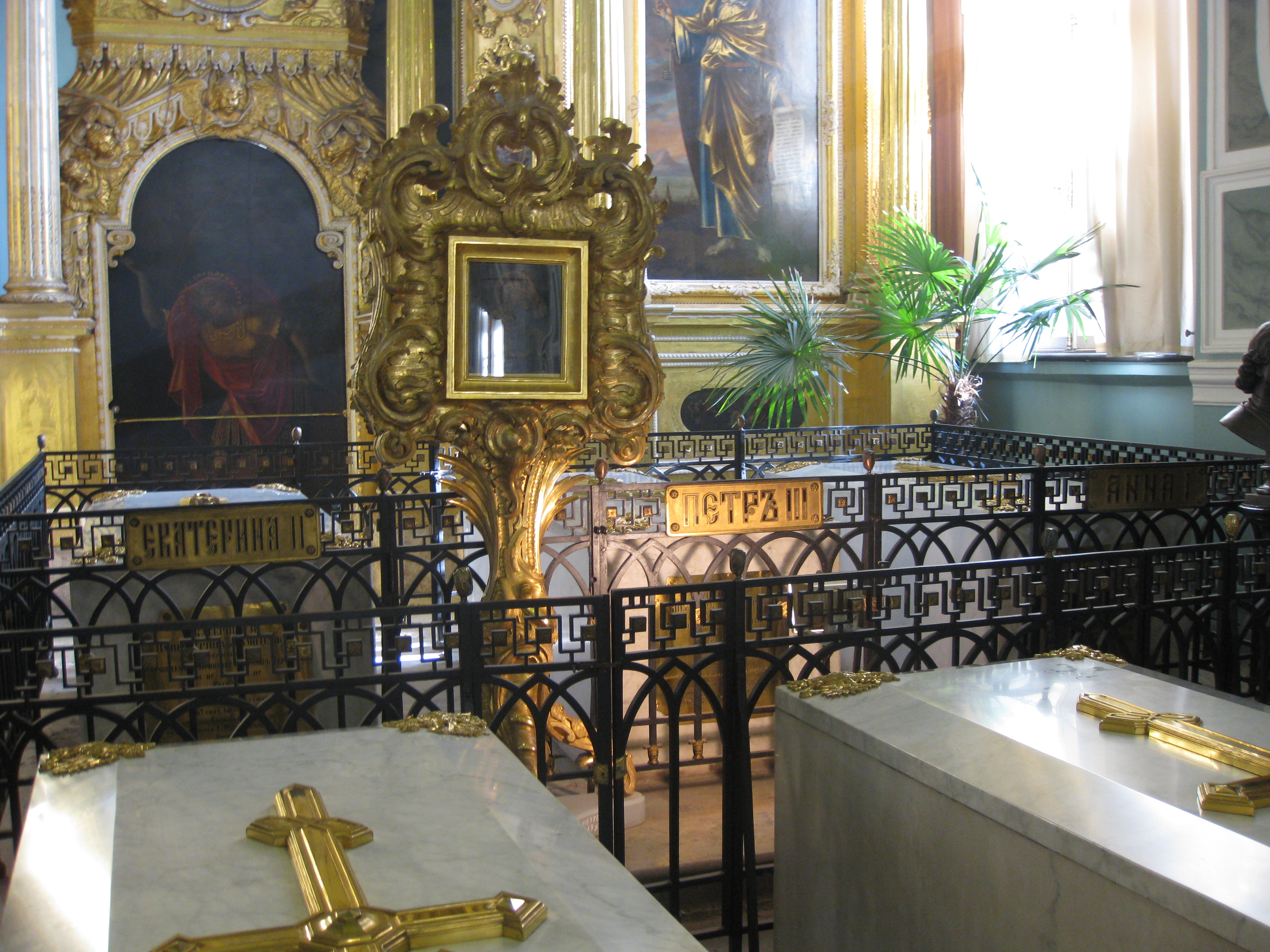 Saint Peter & Paul Cathedral קתדרלת פטרוס ופאולוס במצודת פטרוס ופאולוס סנקט פטרבורג בקתדרלה קבורים כל הצארים (למעט אחד) מאז פיוטר הגדול.